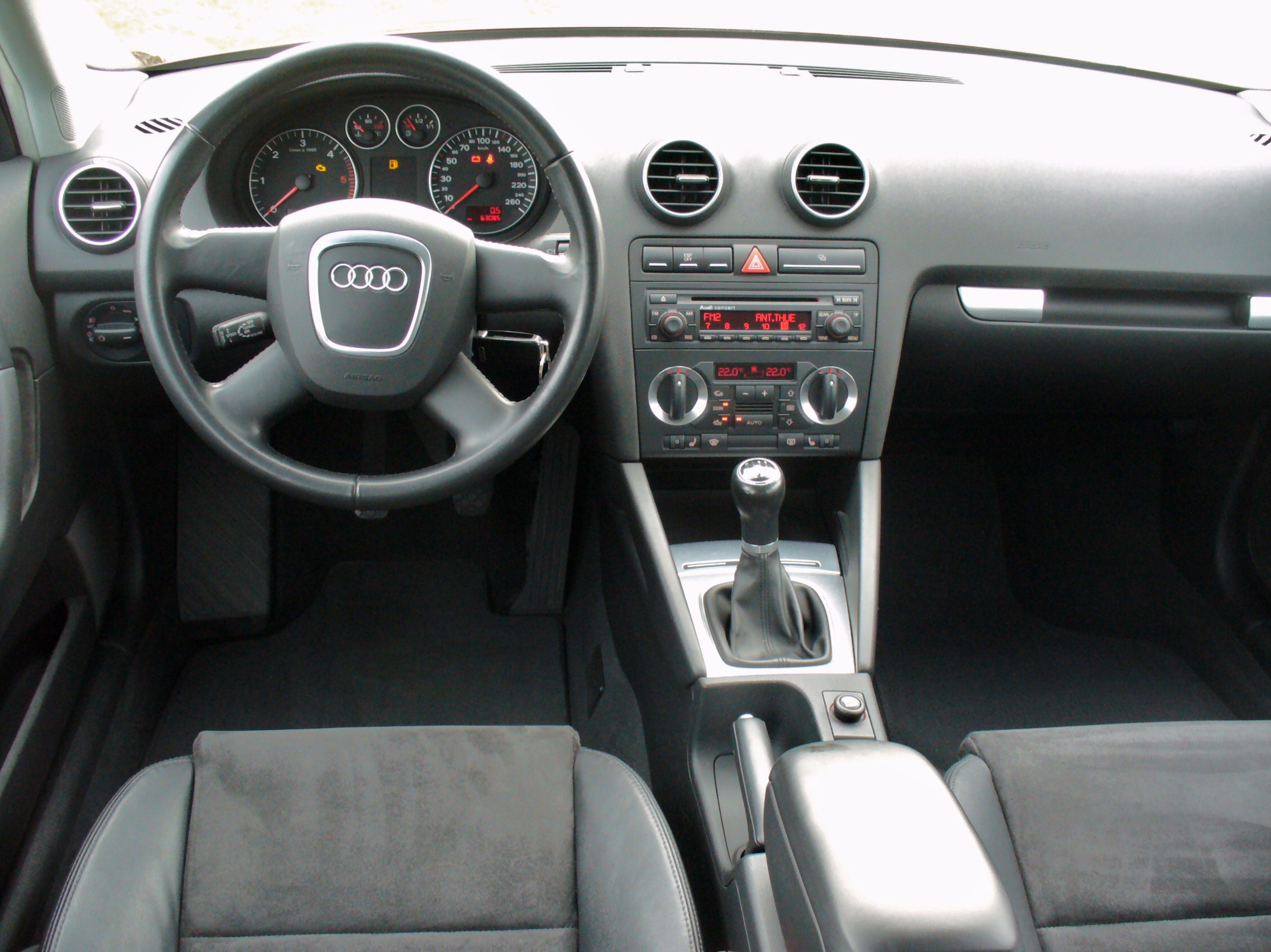 Audi A3 8PA